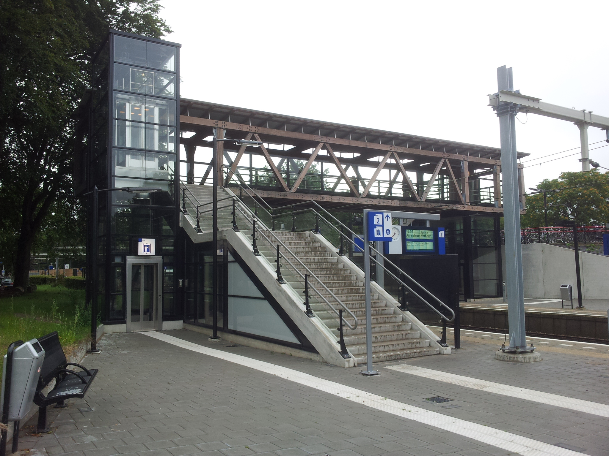 Nieuwe loopbrug over de sporen van station Bussum Zuid.